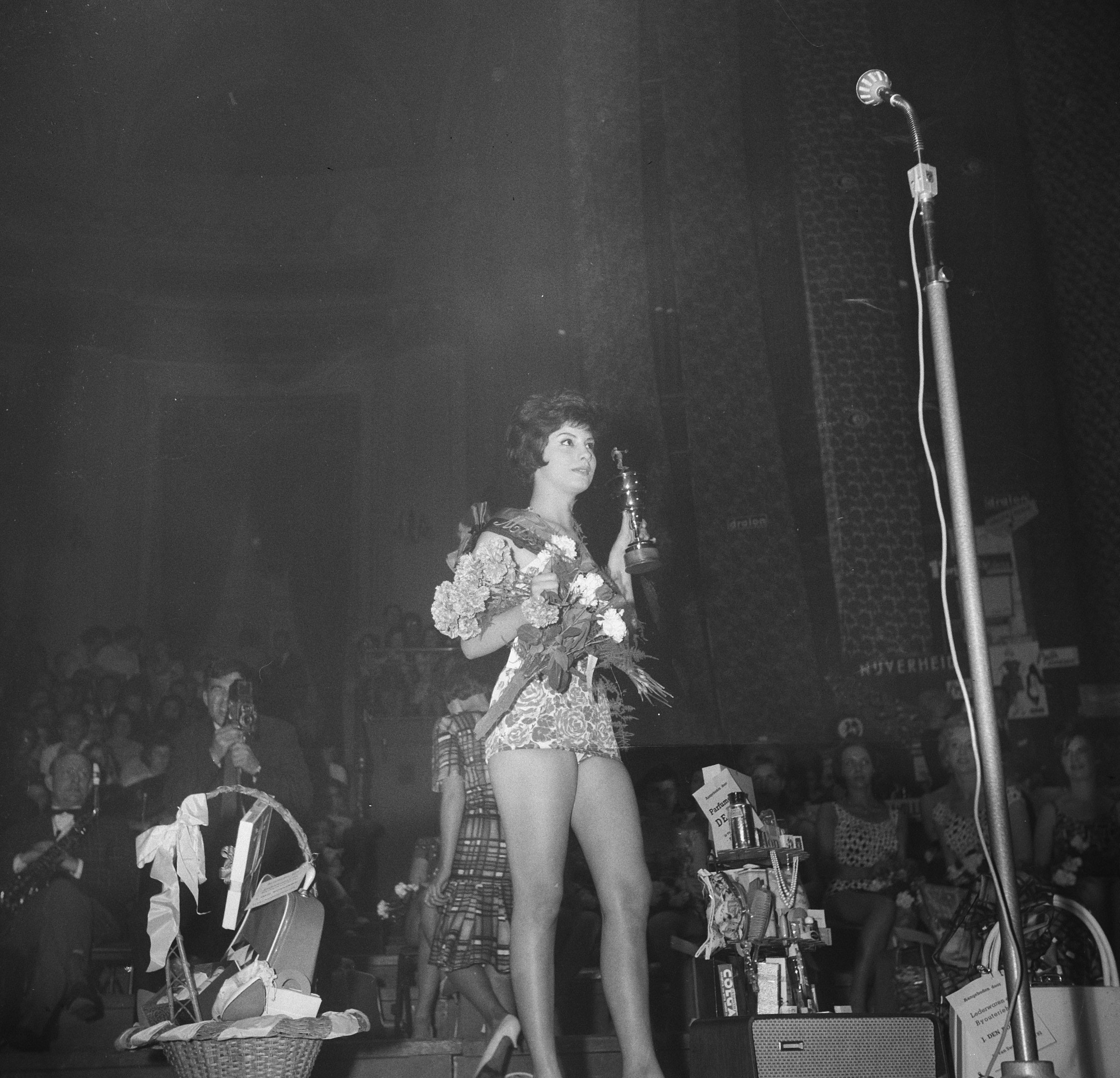 Collectie / Archief : Fotocollectie Anefo Reportage / Serie : Miss Amsterdam 1961 Beschrijving : Verkiezing Miss Amsterdam Datum : 26 april 1961 Locatie : Amsterdam, Noord-Holland Trefwoorden : schoonheidswedstrijden, vrouwen Persoonsnaam : Baer, Constance van Instellingsnaam : Miss Amsterdam Fotograaf : Fotograaf Onbekend / Anefo Auteursrechthebbende : Nationaal Archief Materiaalsoort : Negatief (zwart/wit) Nummer archiefinventaris : bekijk toegang 2.24.01.03 Bestanddeelnummer : 912-4109 Reacties Geplaatst door Amsterdammertje op 30 juni 2015 - 19:16. Persoonsnamen: Baer, van, Stanny NB: Zij werd later dat jaar Miss International (Long Beach, California; juli 1961)